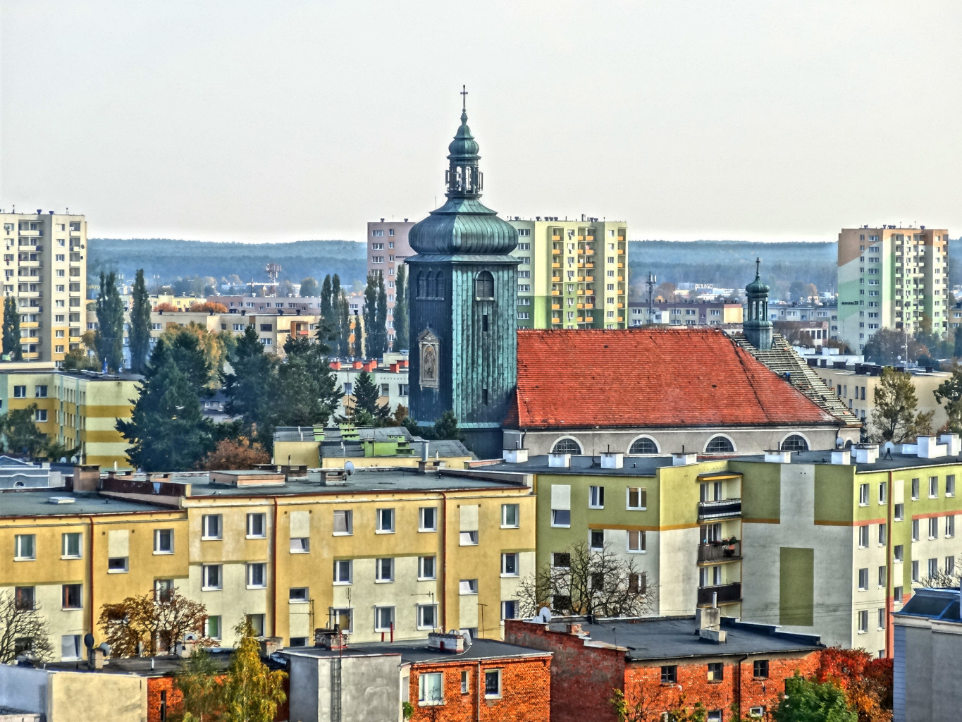 Kościół Matki Boskiej Nieustającej Pomocy w Bydgoszczy na os. Szwederowo, zbud. 1928 r. - widok z wieży ciśnień